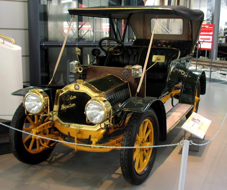 De-Dion-Bouton Torpedo (1909)4 Zylinder, 1370 cm³ Hubraum, 12 PS.